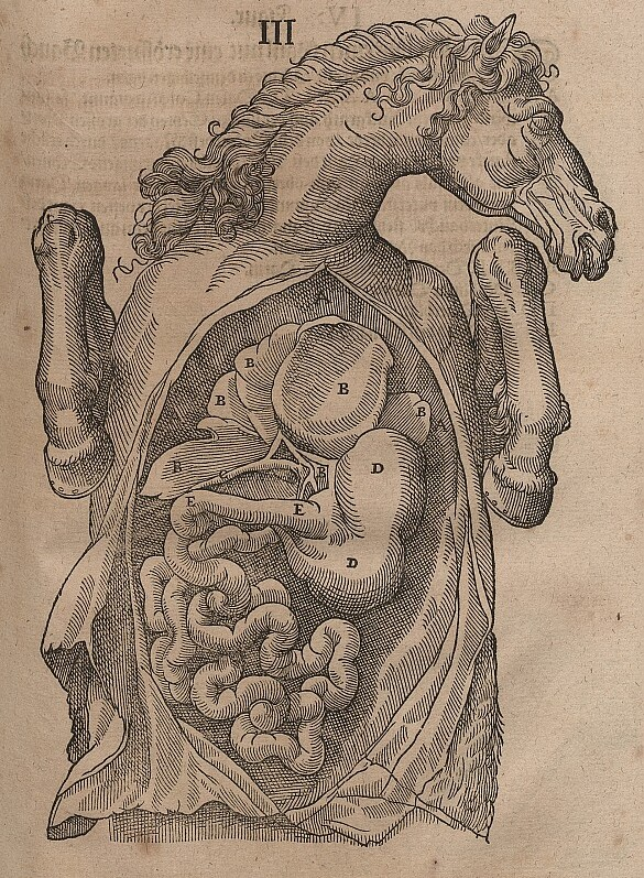 Original image description from the Deutsche Fotothek Biologie & Veterinärmedizin & Pferd & Organ